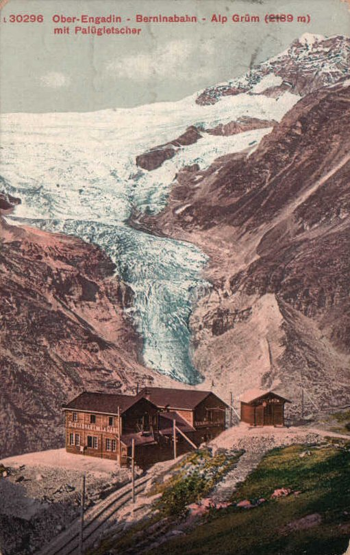 Der Palügletscher mit der Haltestelle Alp Grüm der Rhätischen Bahn um 1910 kurz nach der Eröffnung der Bahnstrecke. Nachkolorierte zeitgenössische Postkarte des Verlags Edition Photoglob, Zürich